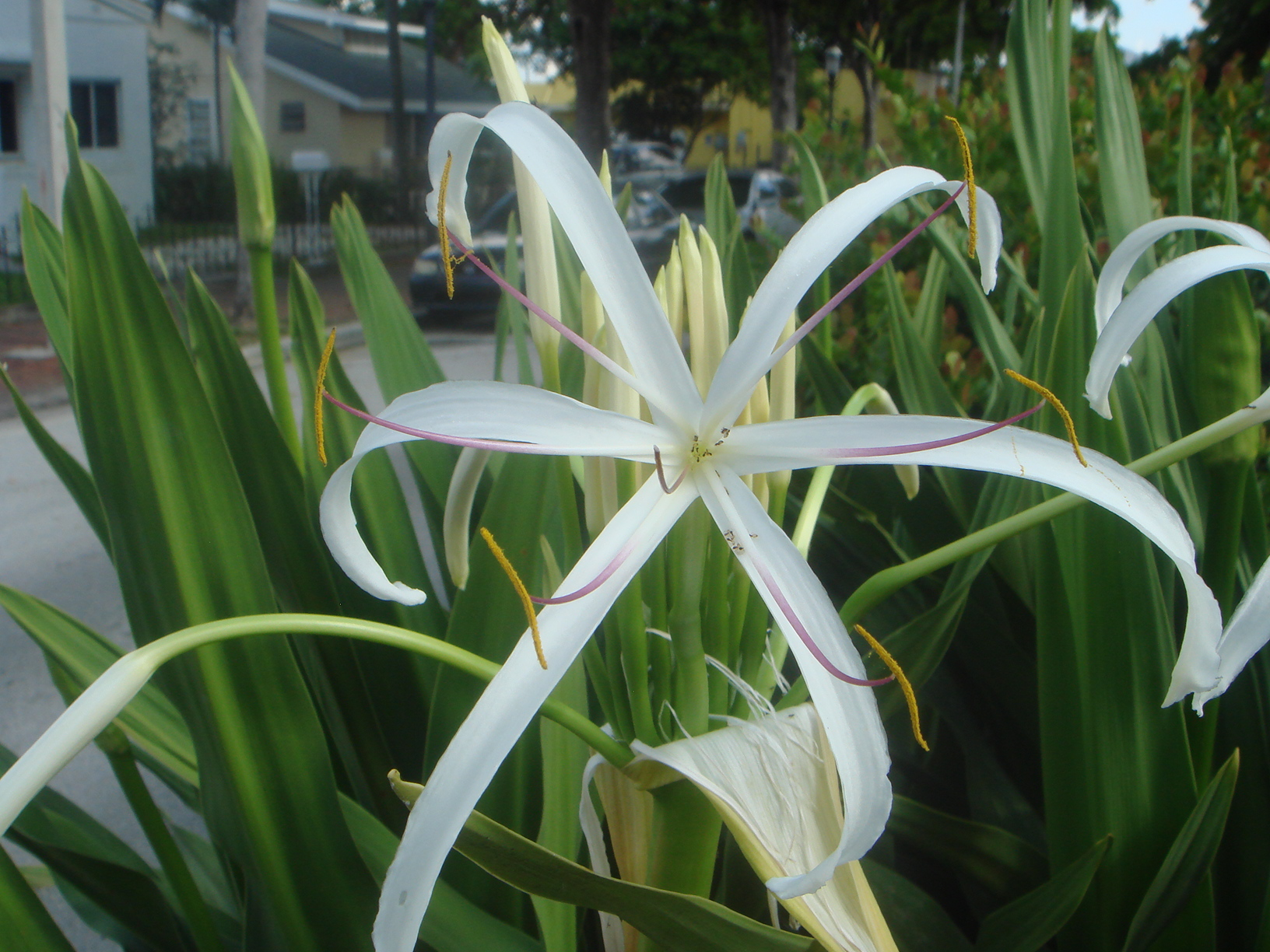 Crinum americanum, Miami Fl. EE.UU.